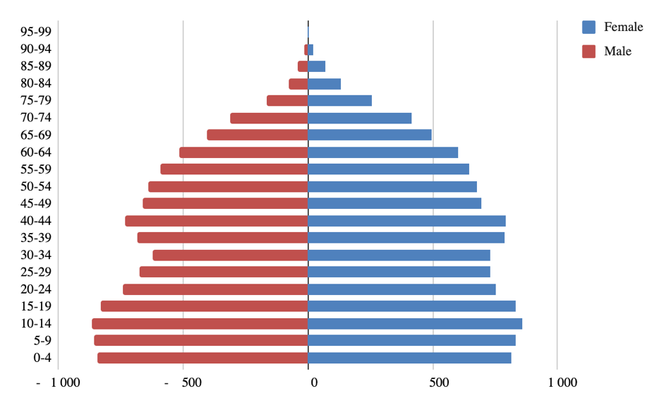 Sri Lanka rahvastikupüramiid